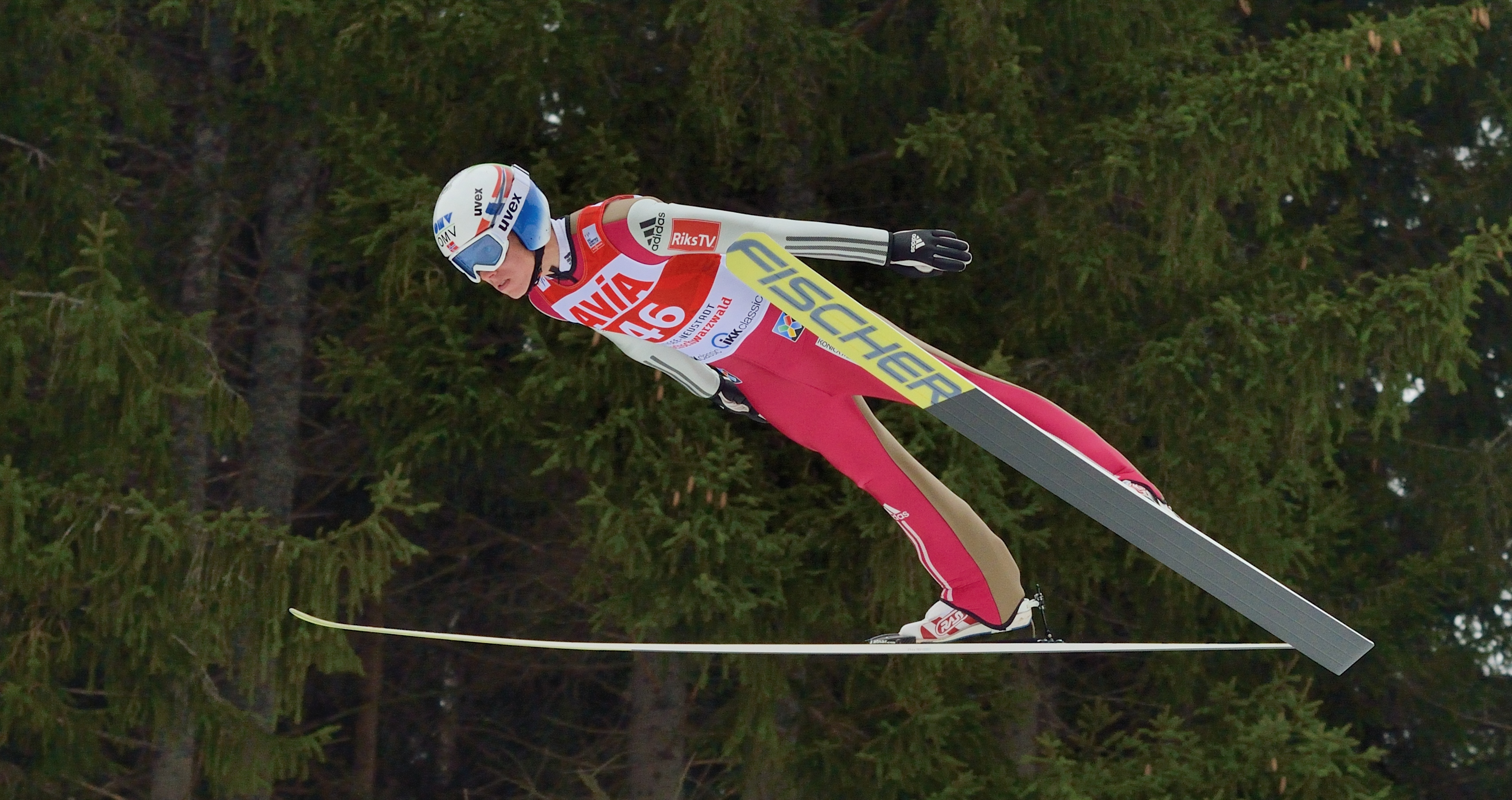 FIS Ski Weltcup Titisee-Neustadt 2016: Johann Andre Forfang